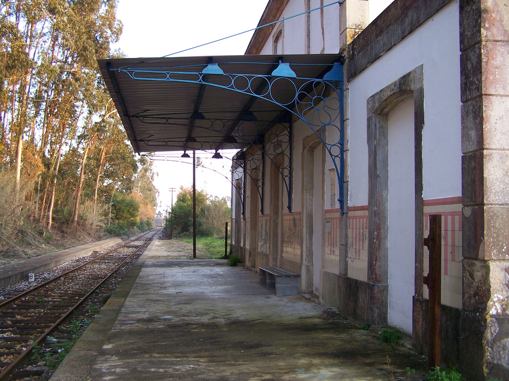 A very derty train station of the Ramal da Figueira (Figueira da Foz - Cantanhede - Coimbra)